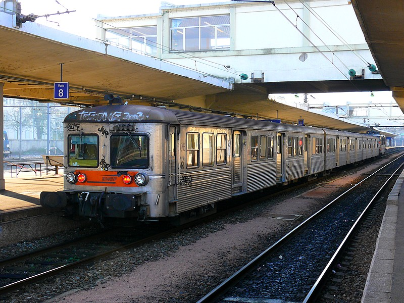 RIB type 76 n°606 du TER Alsace. Cette rame a été mise en service à Noisy-le-Sec entre 1978 et 1980.